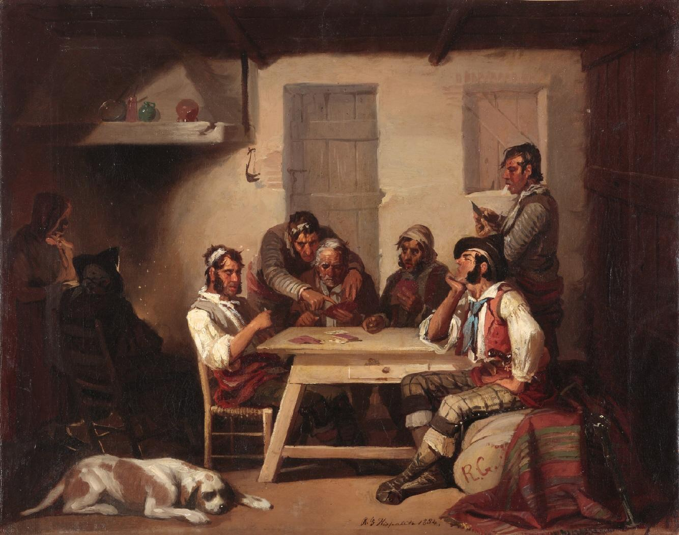 Jugando a las cartas. Cuadro costumbrista del siglo XIX